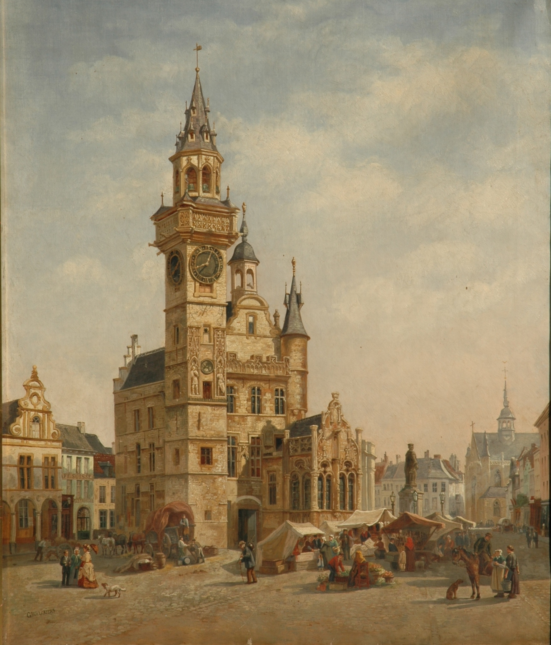 Ce batiment est l’ancien hôtel de ville d’Alost datant de 1225 mais reconstruit durant le 13e siècle. Il lui fut adjoint un beffroi en 1460. Tableau de Gustave Walckiers datant des années 1880.